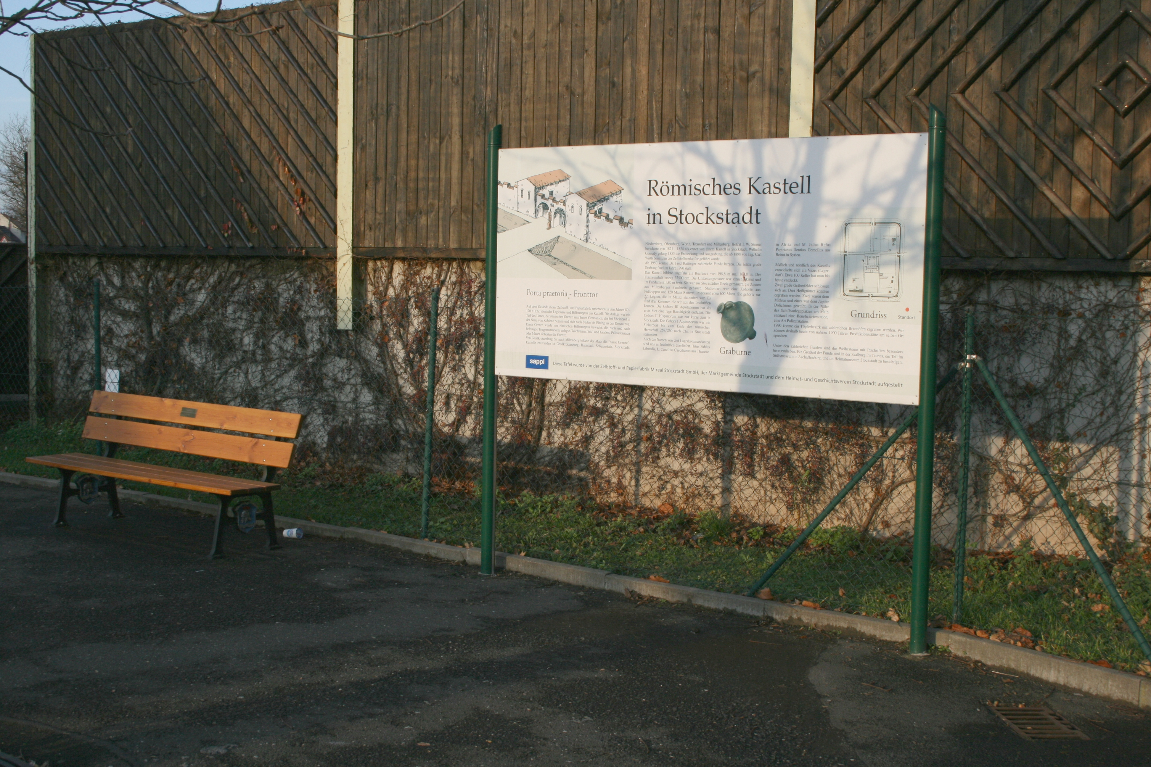 Hinweistafel auf das Kastell Stockstadt, 2009. Der Inhalt ist teilweise stark fehlerhaft.